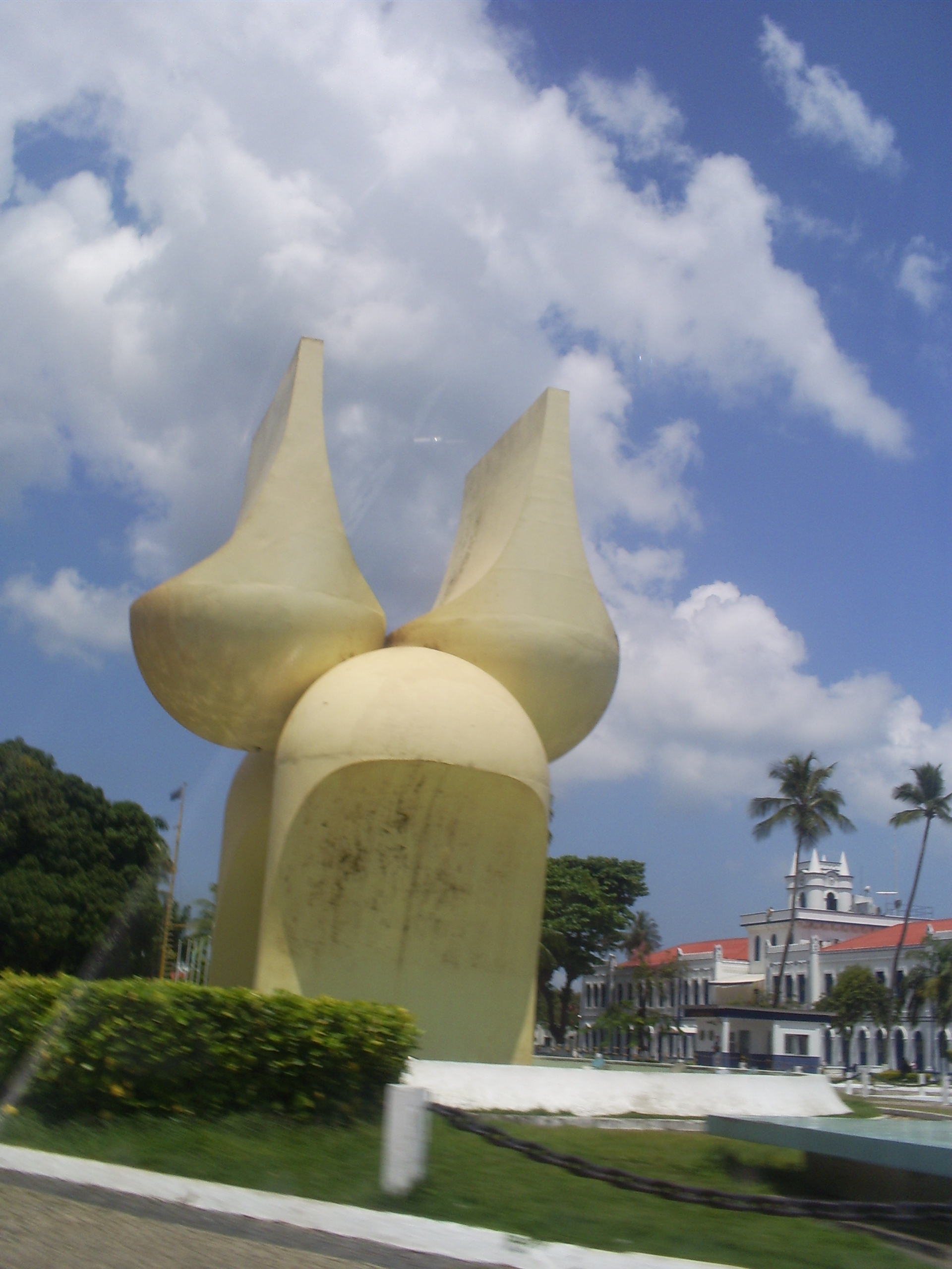 Foto do Monumento à Cidade de Salvador, Salvador, Bahia, Brasil.